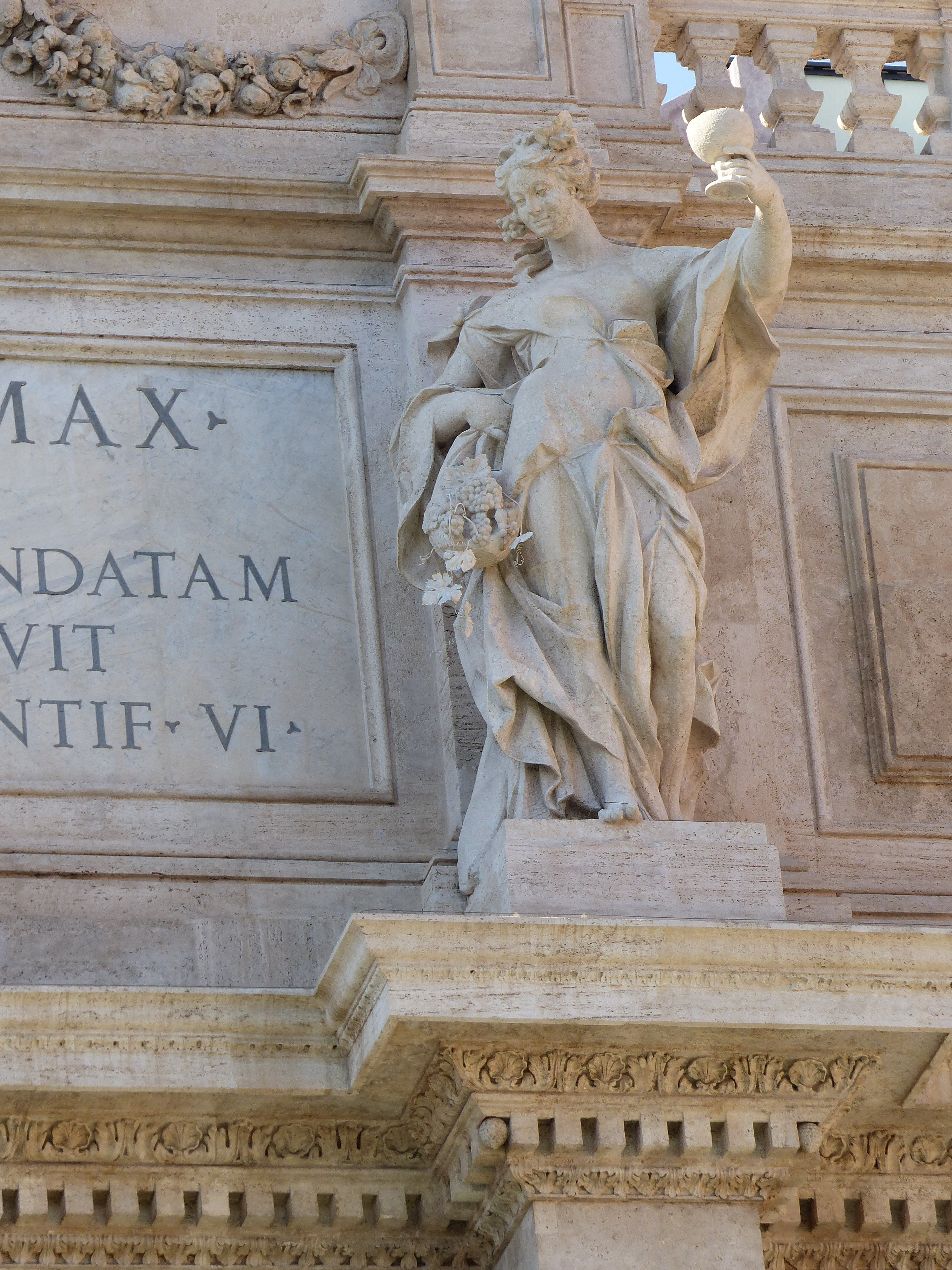 Fontana de Trevi, detalles.